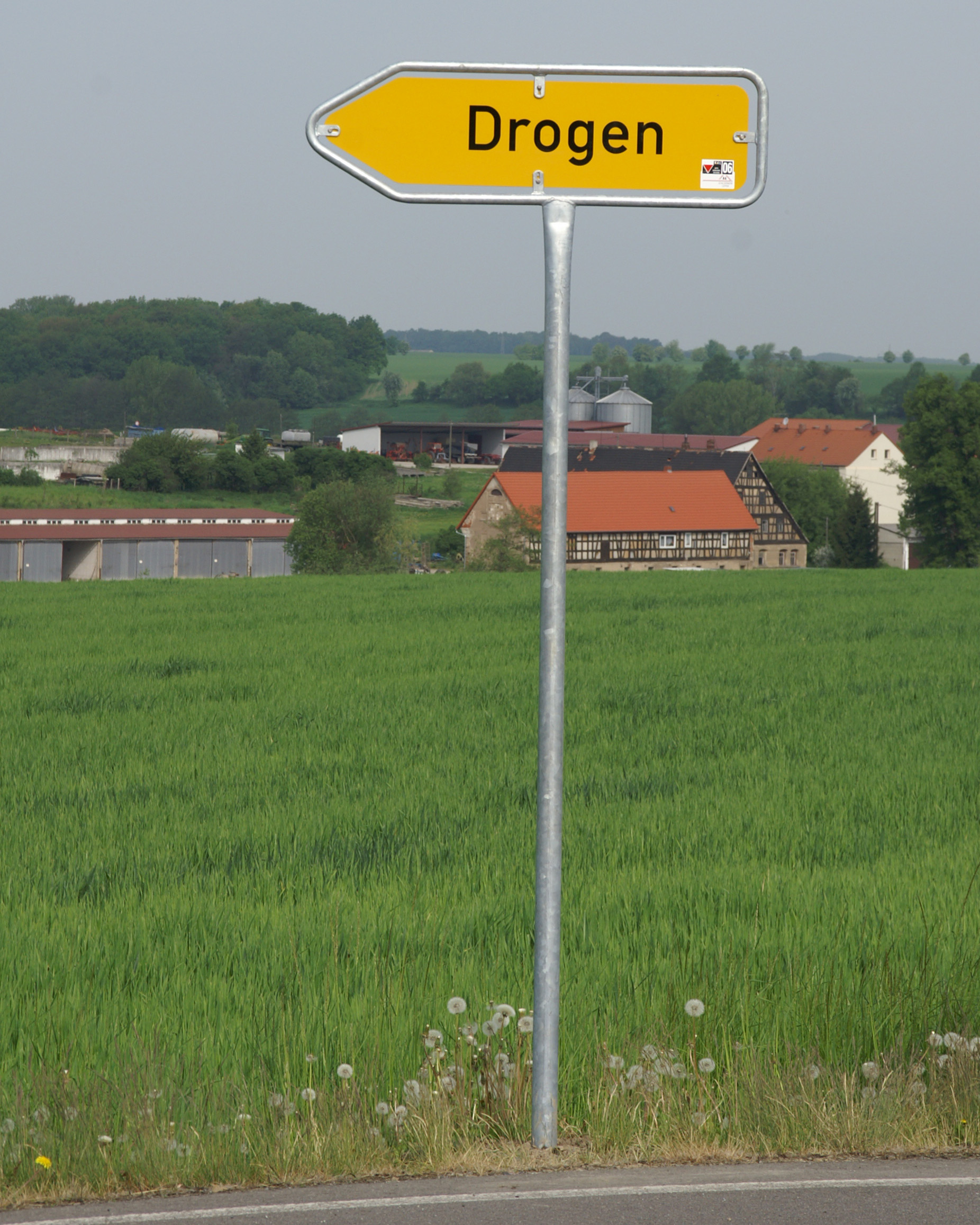 Wegweiser nach Drogen, Germany.